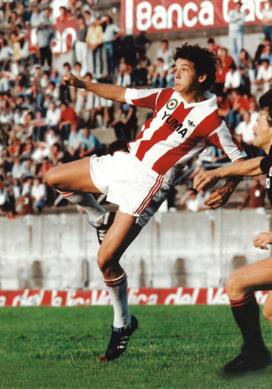 Un giovane Roberto Baggio al L.R. Vicenza nella stagione 1982-83.